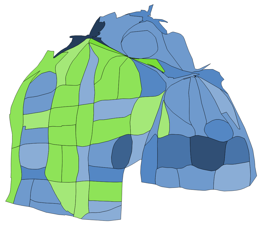 顏色對照表